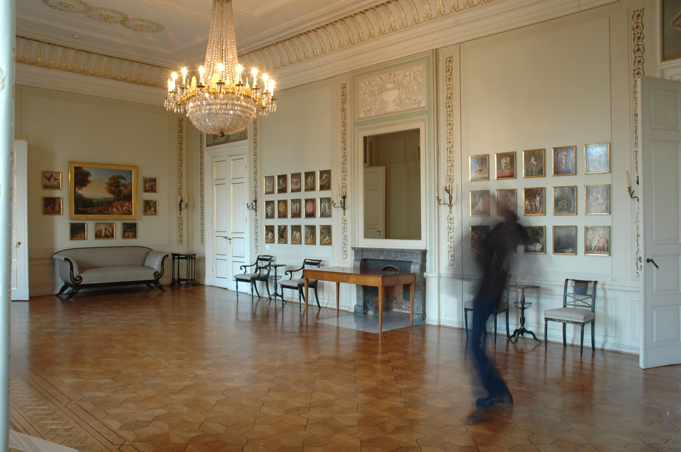 Historisches Bildensemble von J.H.W.Tischbein gestaltet